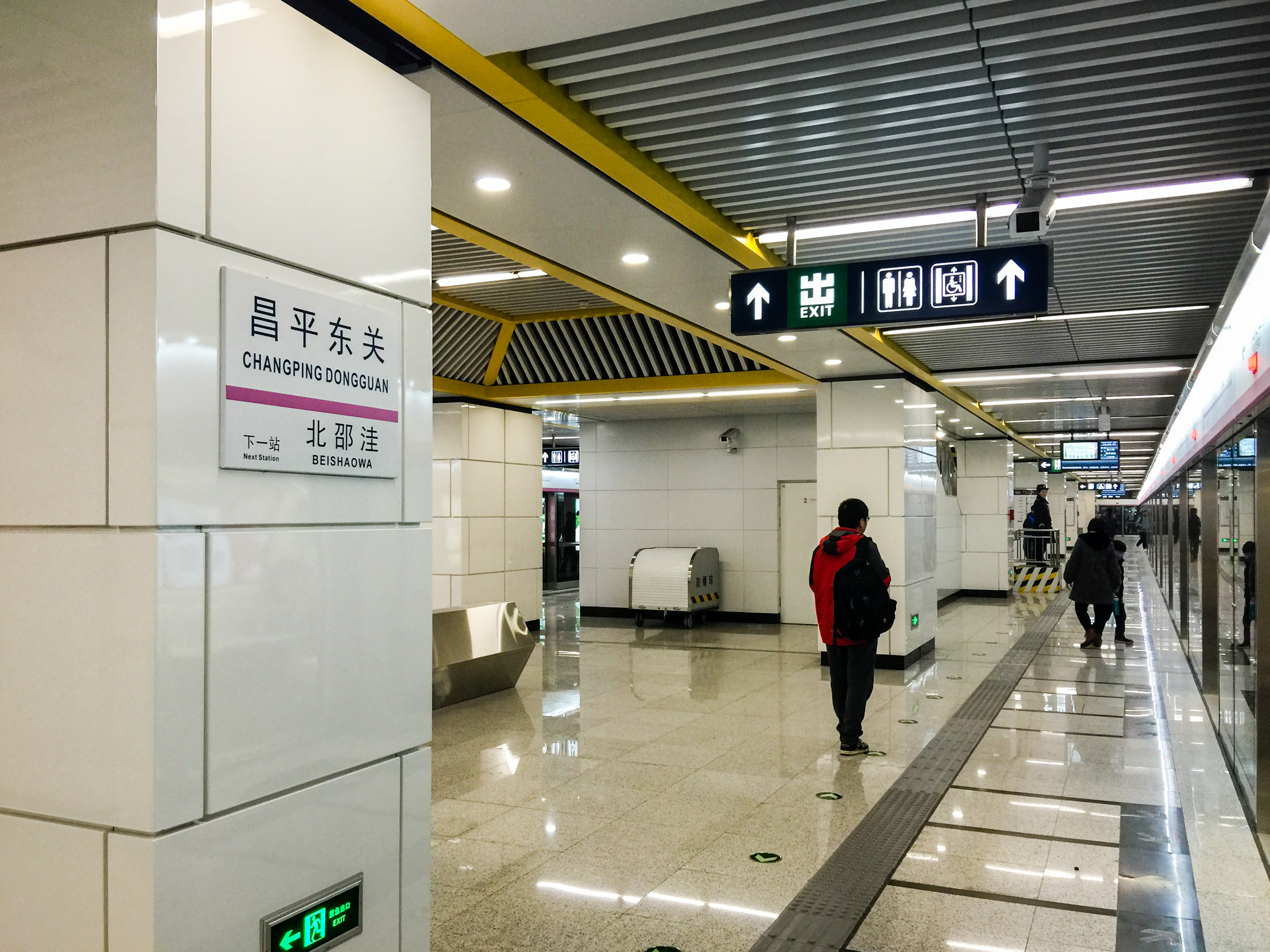 中文（中国大陆）: 北京地铁昌平线昌平东关站站台，2015年12月26日